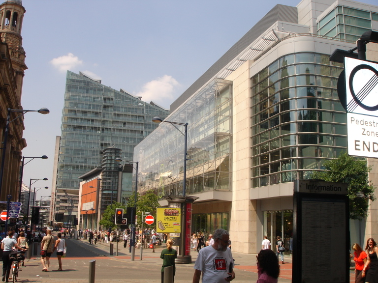 source OWN!!!